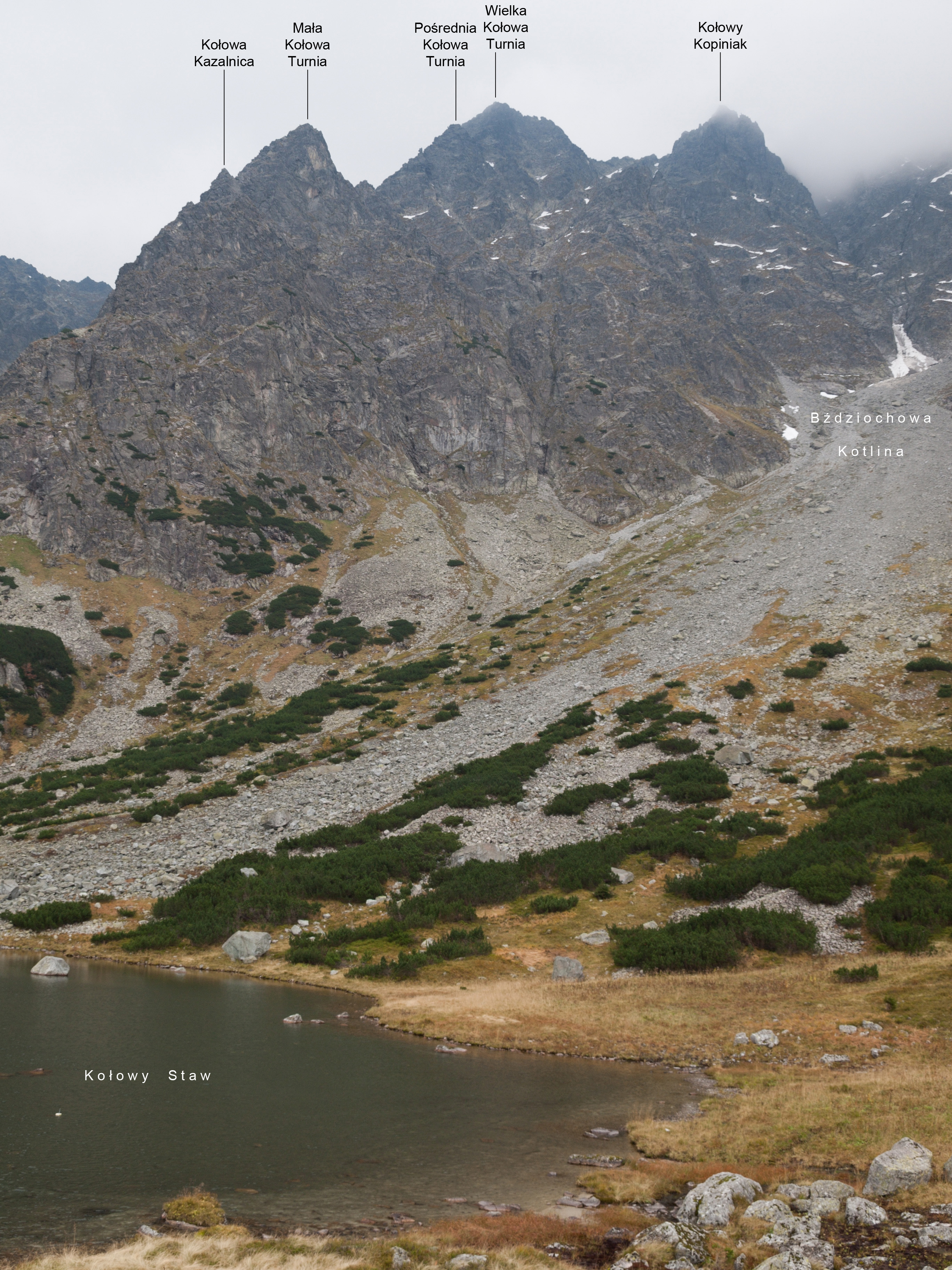 Kołowe Turnie i Kołowy Kopiniak (podpisy).